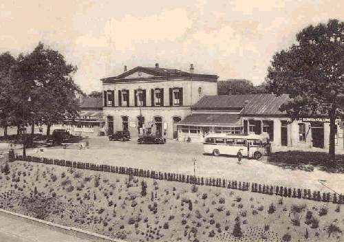 Het voormalige station van Enschede. Foto uit 1943.